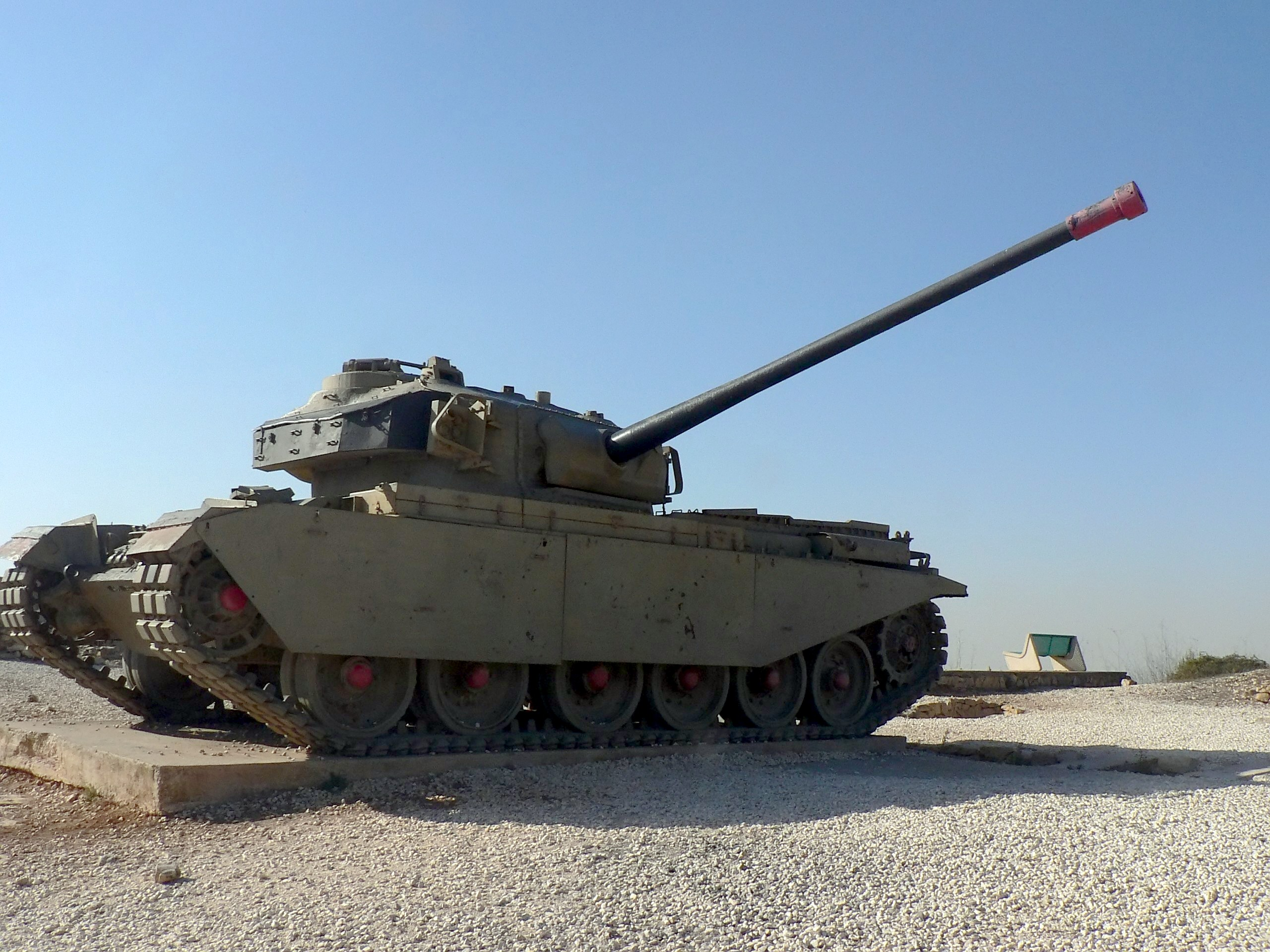 Har Adar Hill (The Radar Hill), Israel - Centurion tank גבעת הר אדר - גבעת הרדאר טנק צנטוריון